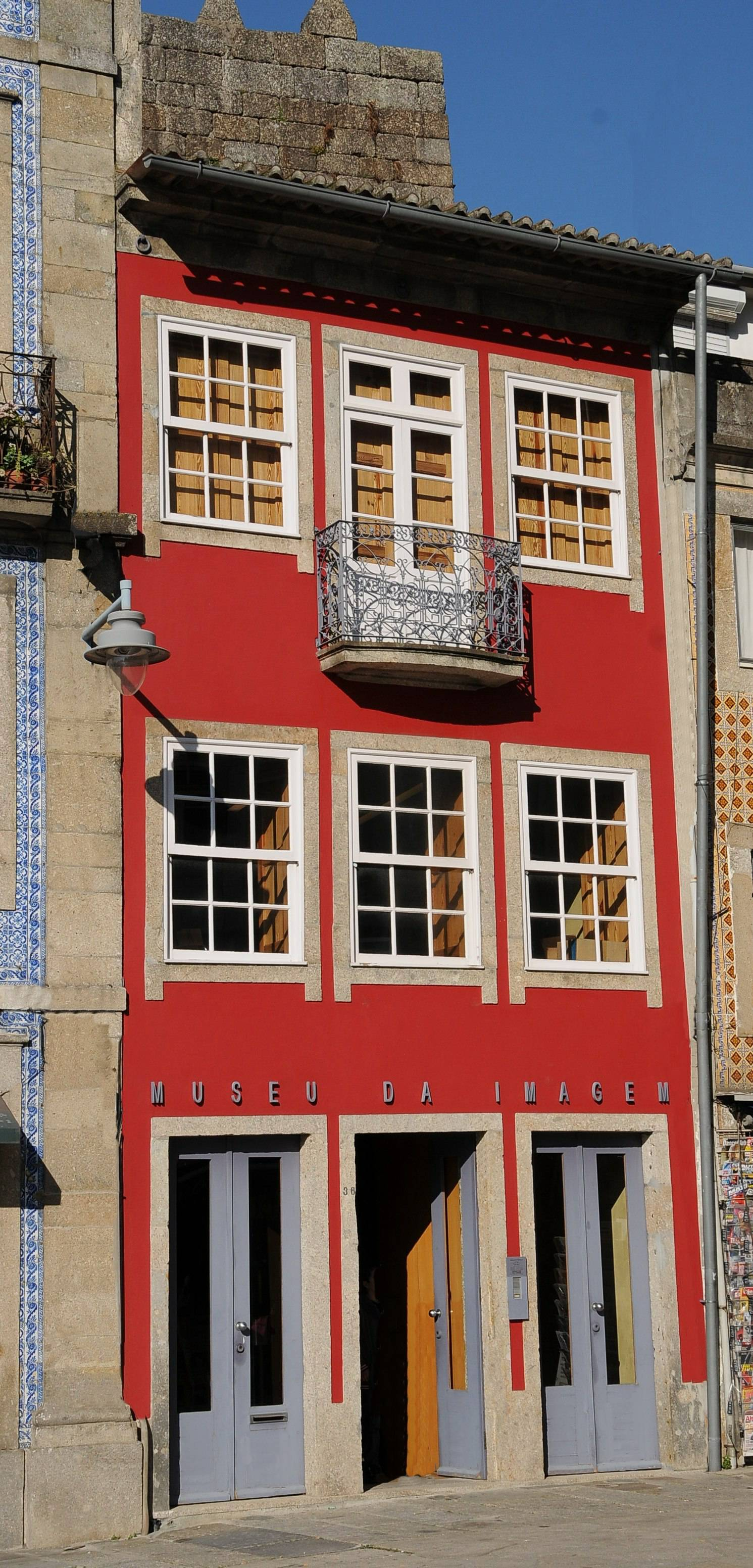 Foto:José Gonçalves